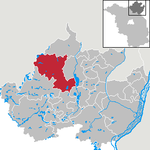 Nordwestuckermark in Brandenburg (Country) - District Uckermark